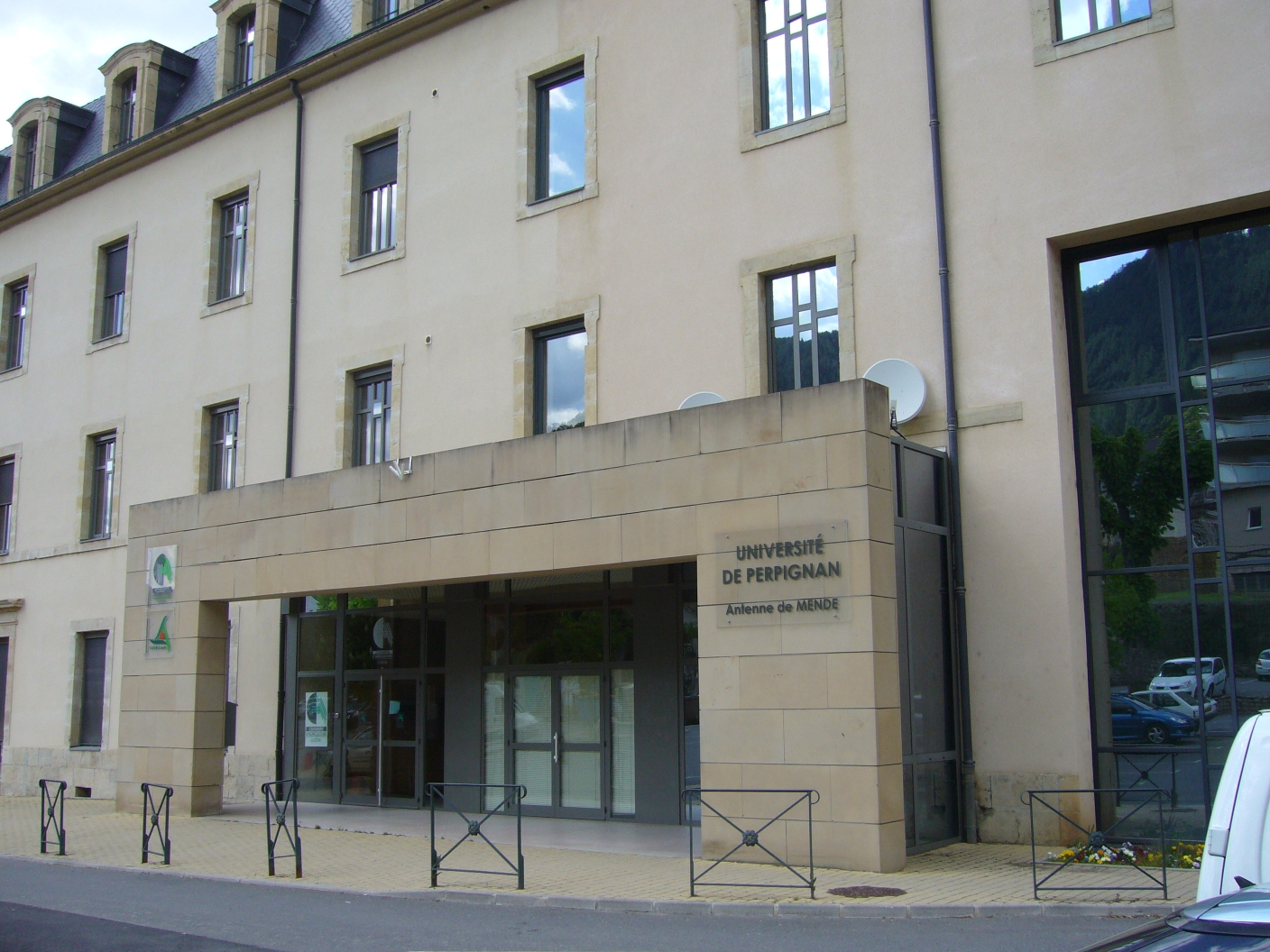 Antenne de l'université de Perpignan à Mende (Lozère, France)